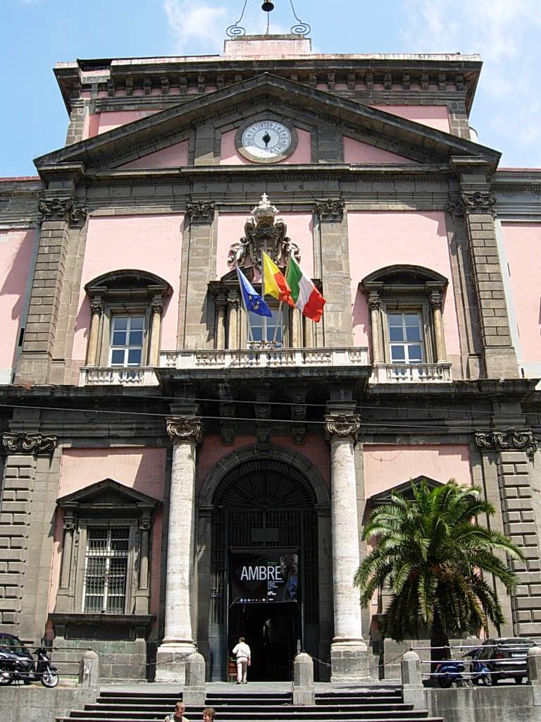 Museo archeologico nazionale di Napoli. Foto personale concessa in PD.